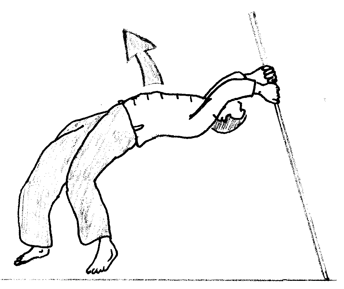 dhanda0.jpg